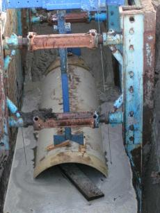 Flüssigbodeneinbau im Grundwasserbereich